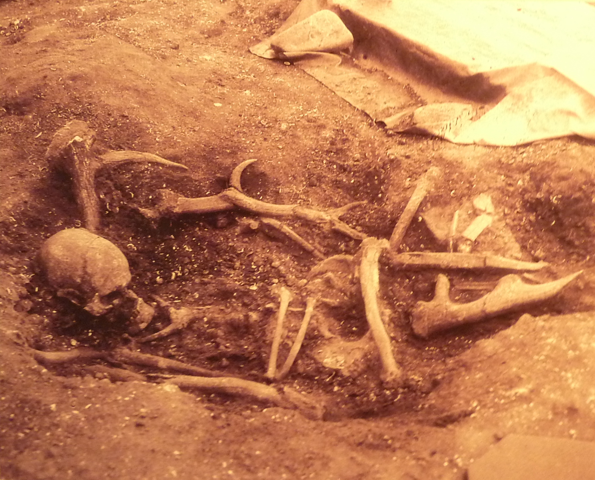 Sépulture "K" de Téviec (squelette d'un chasseur entouré de bois de cerf ; photographie prise en 1929 par Saint-Just Péquart)